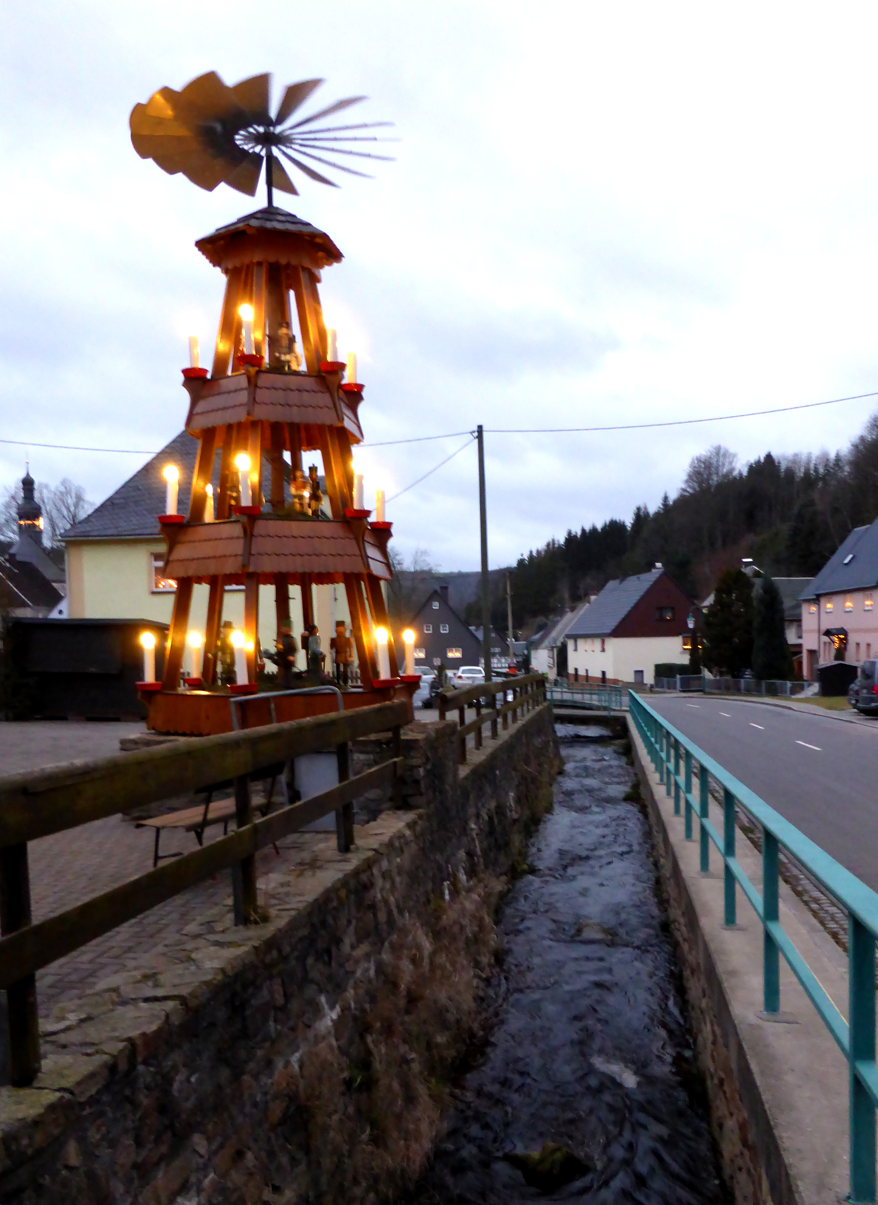 Ortspyramide in Steinbach (Jöhstadt), Erzgebirgskreis - Sachsen.